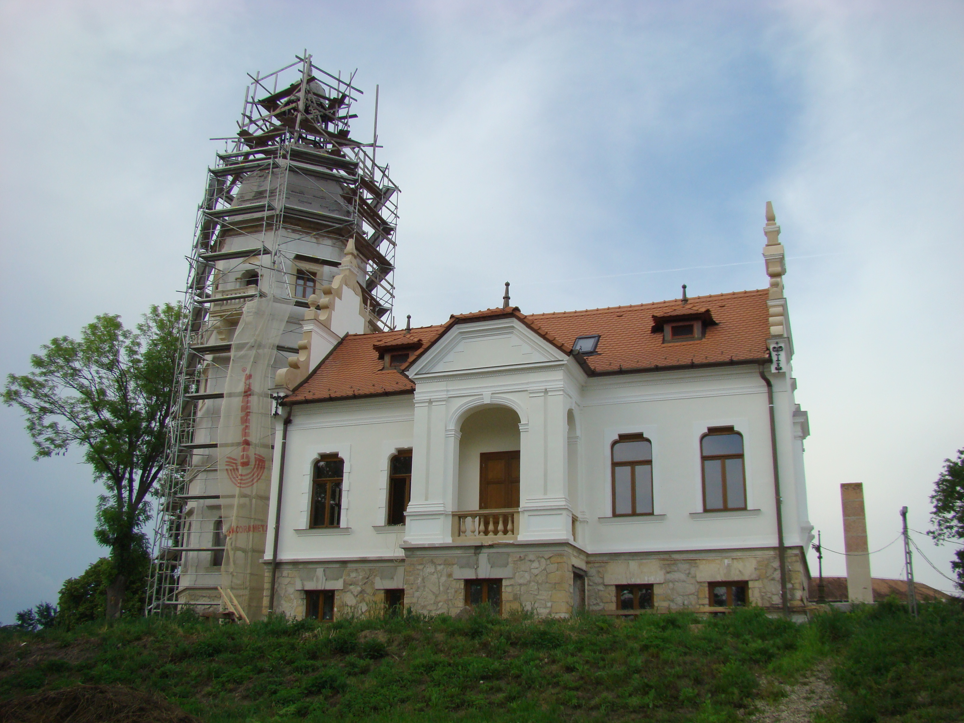 Castelul Banffi, sat aparținător Sâncrai; municipiul Aiud, județul Alba 01